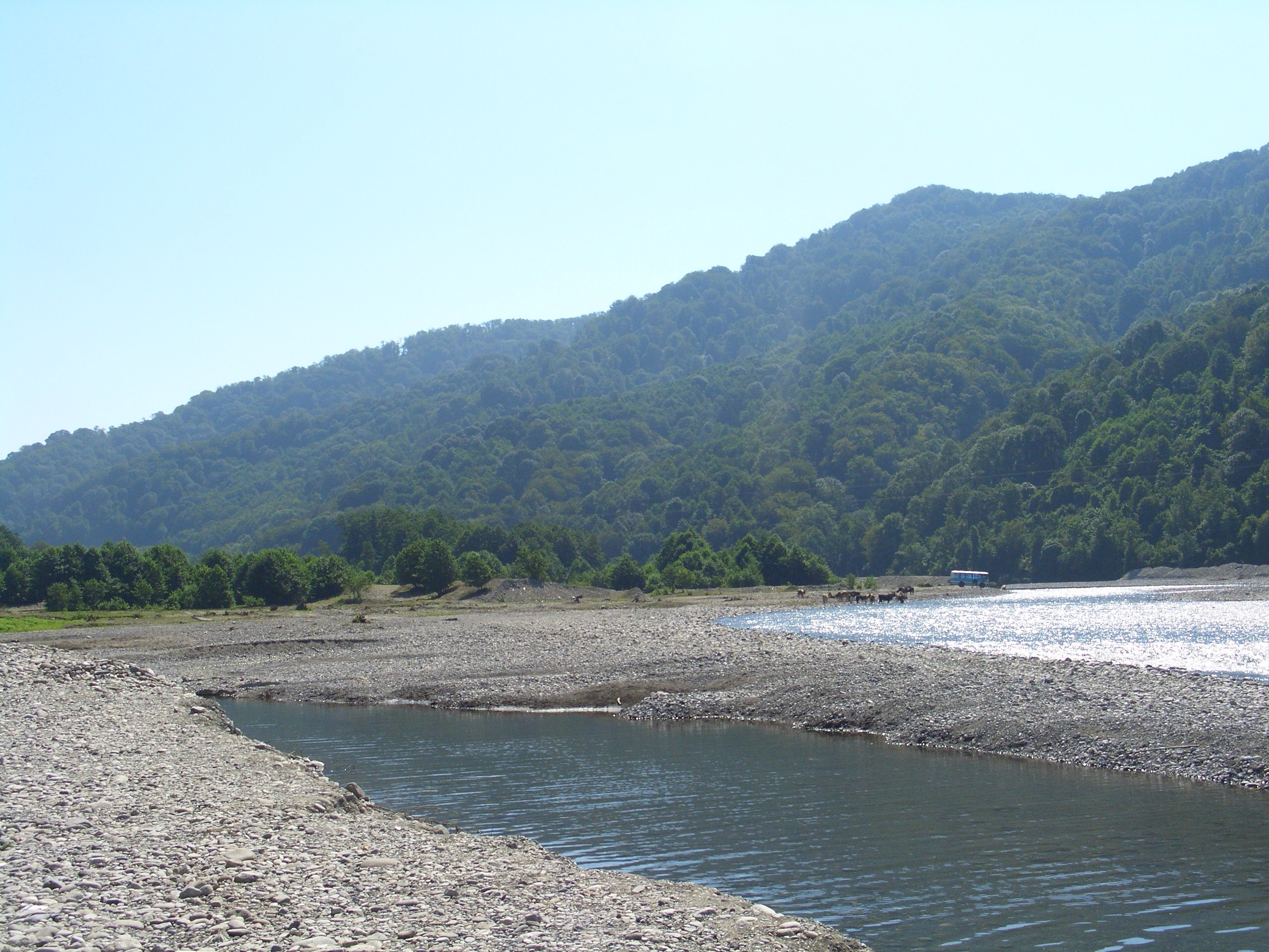 Sochi, Schahe river